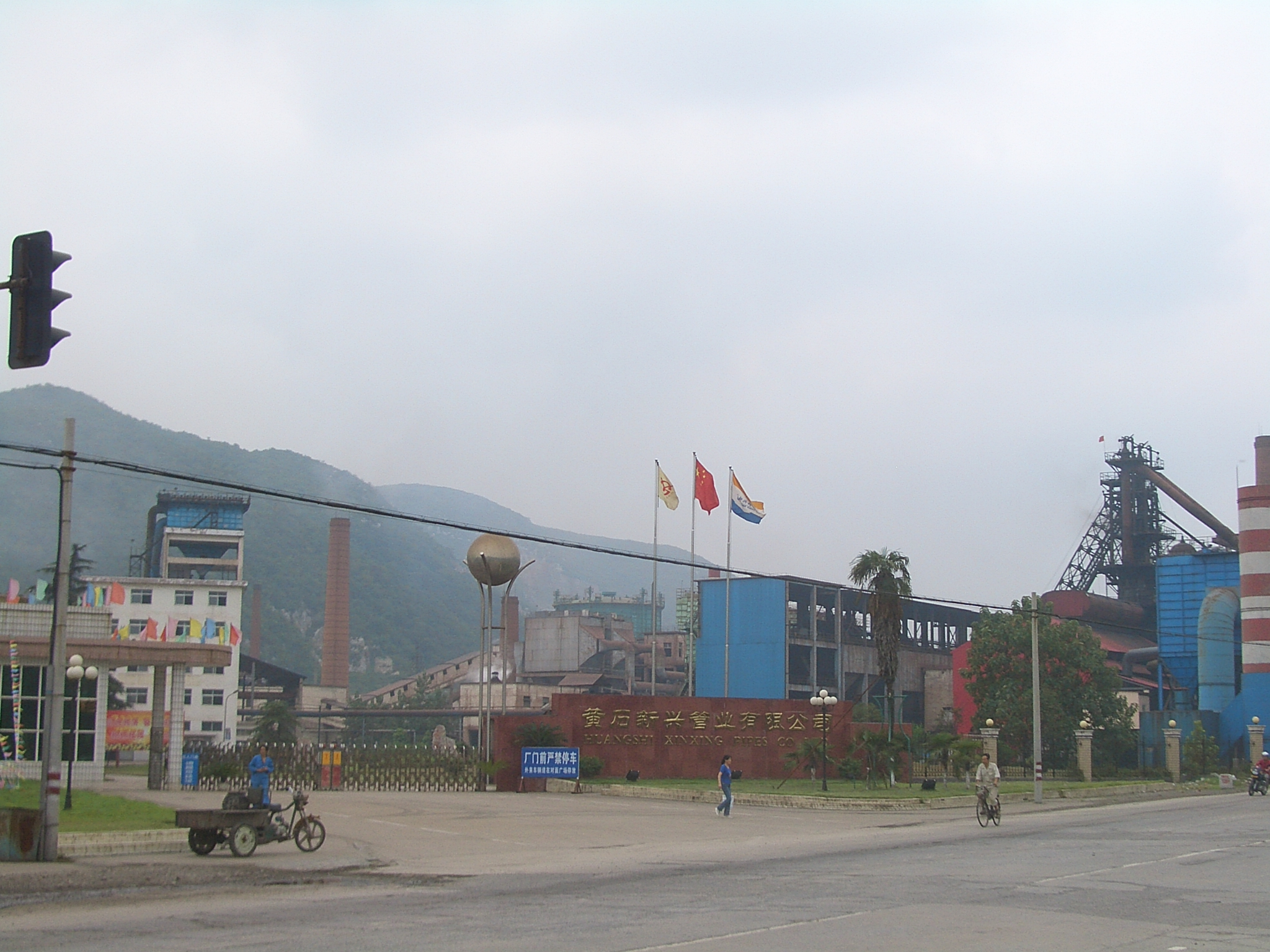 A plant of Huangshi Xinxing Pipes Co., in Xialu Qu, Huangshi Prefecture-Level City